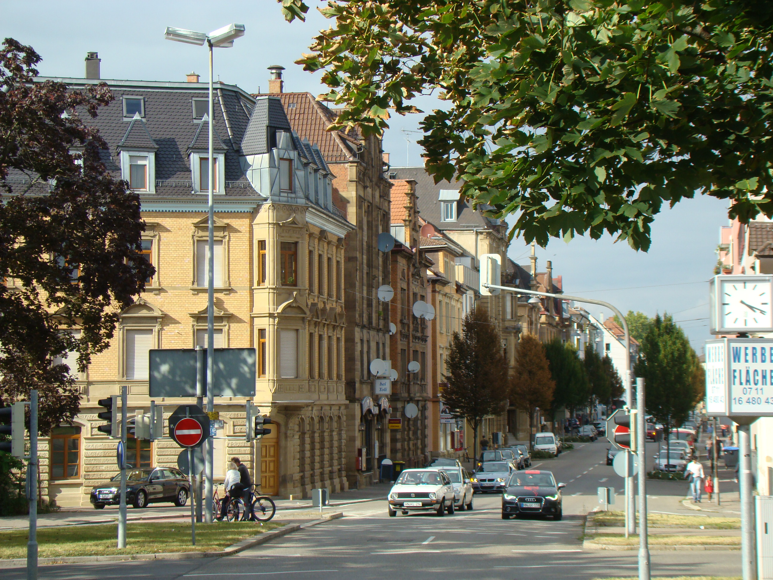 Rathenauplatz in Heilbronn, Blick in die Wilhelmstraße mit Eckhaus Nr. 68, vgl. Denkmaltopographie Ba-Wü Bd. I.5 Heilbronn (2007), S. 140 und Abb. 411